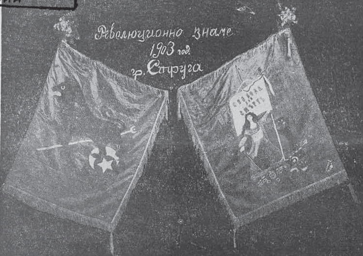 Struga Ilinden flag